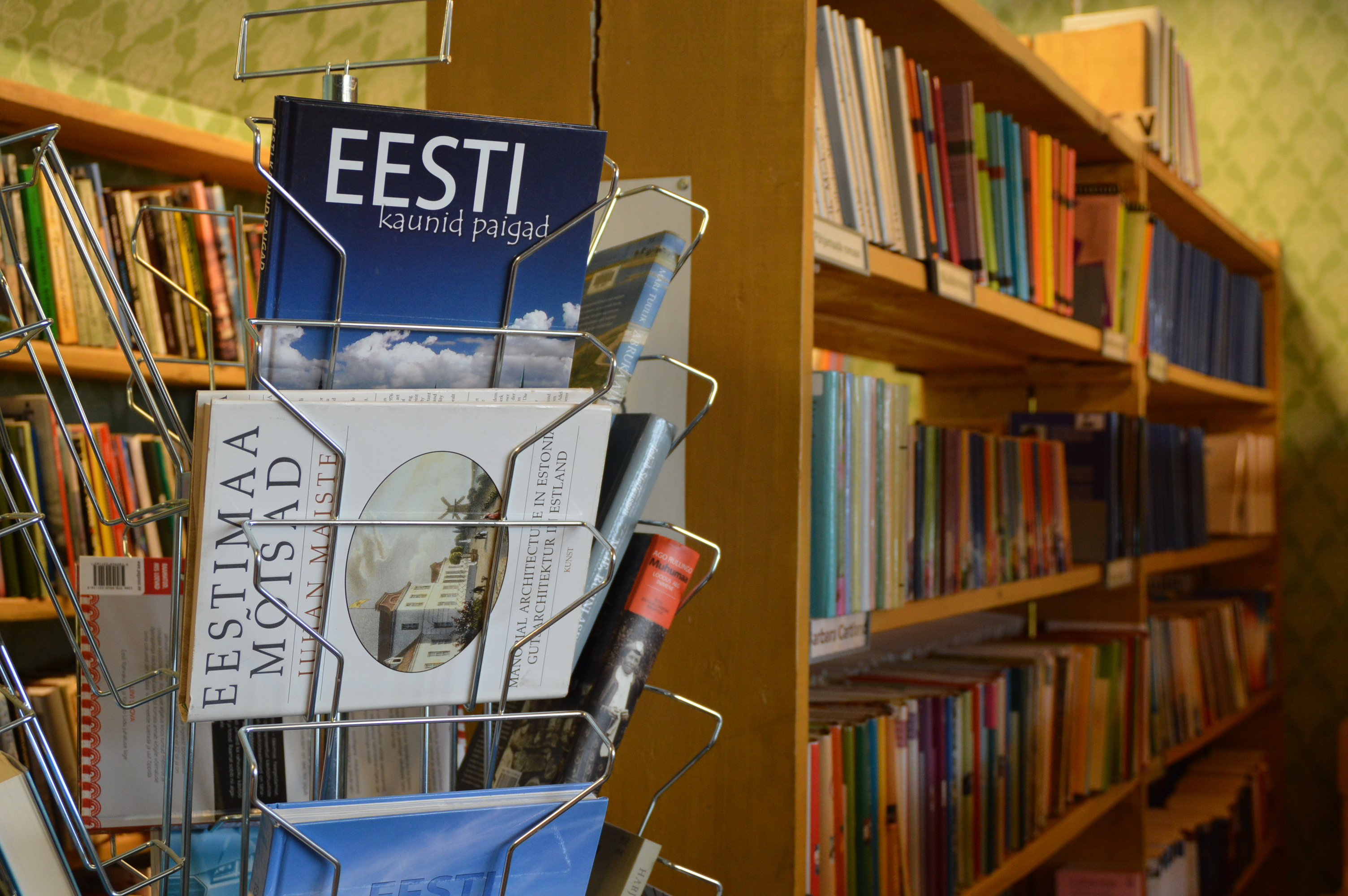 Prangli raamatukogu sisevaade